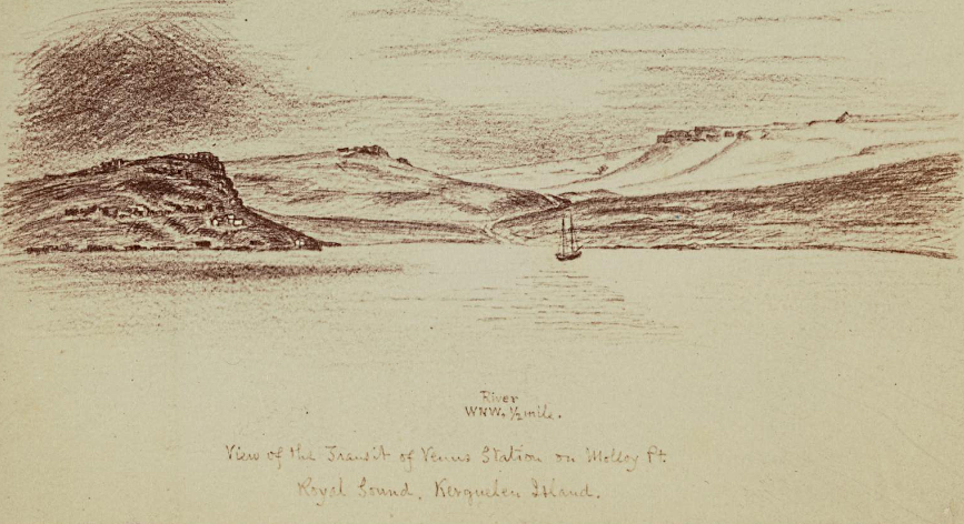 Croquis réalisé par l'astronome américain William Harkness de la station américaine d'observation du transit de Vénus installée en 1874 sur le site de Molloy (îles Kerguelen)